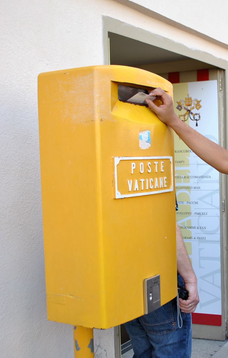 Buzón del Poste Vaticane fuera de la oficina de la Plaza de San Pedro